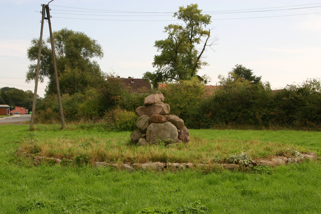 Zawada (dodatkowa nazwa w j. niem. Zowade) – wieś w Polsce położona w województwie opolskim, w powiecie prudnickim, w gminie Głogówek.